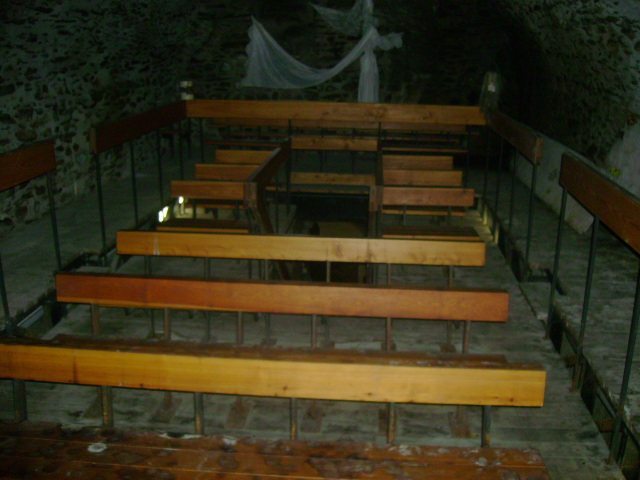 Divadélko ve Žlutickém podzemí